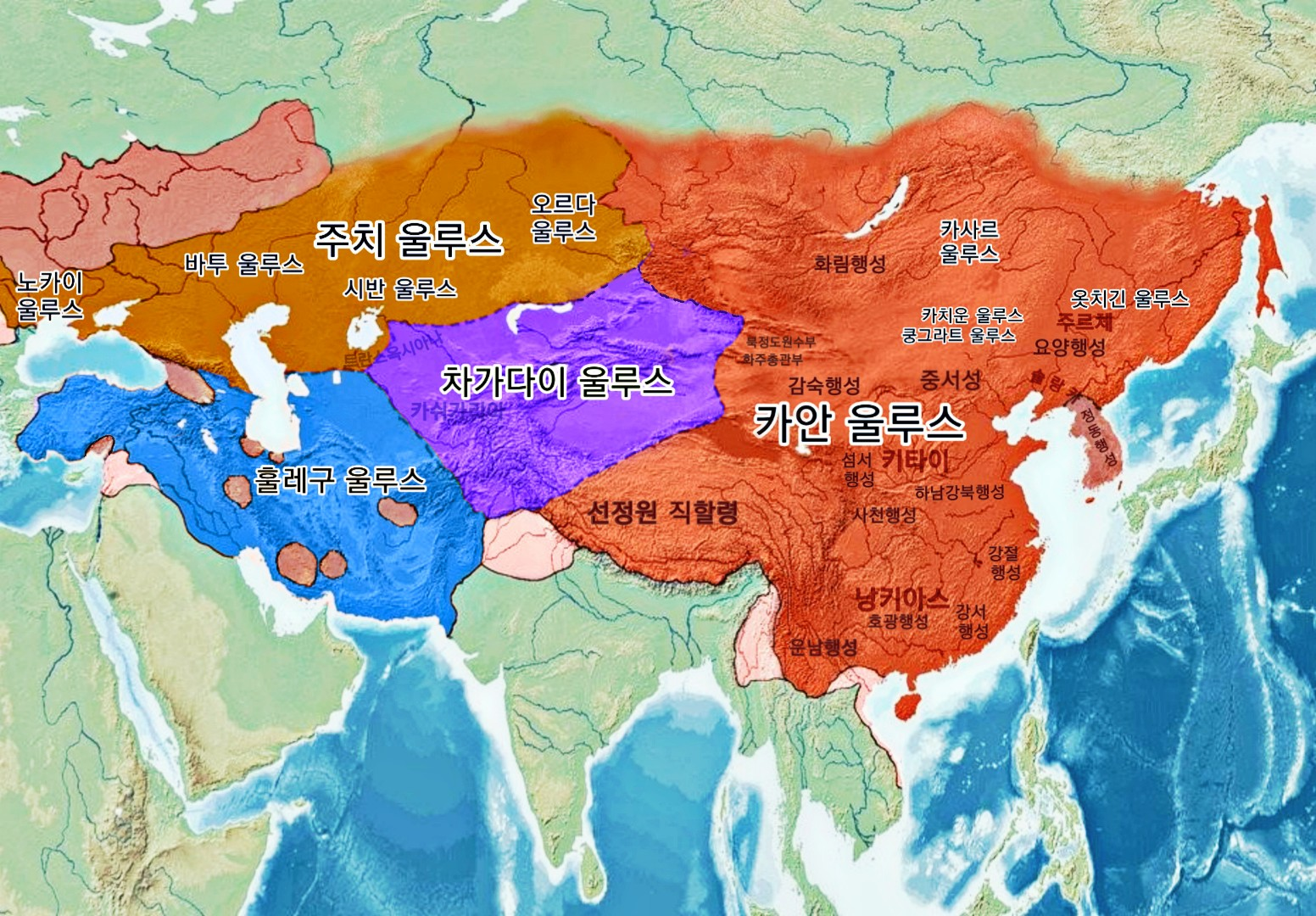 몽골제국(Dai Ön Yeke Mongghol Ulus) 지도.